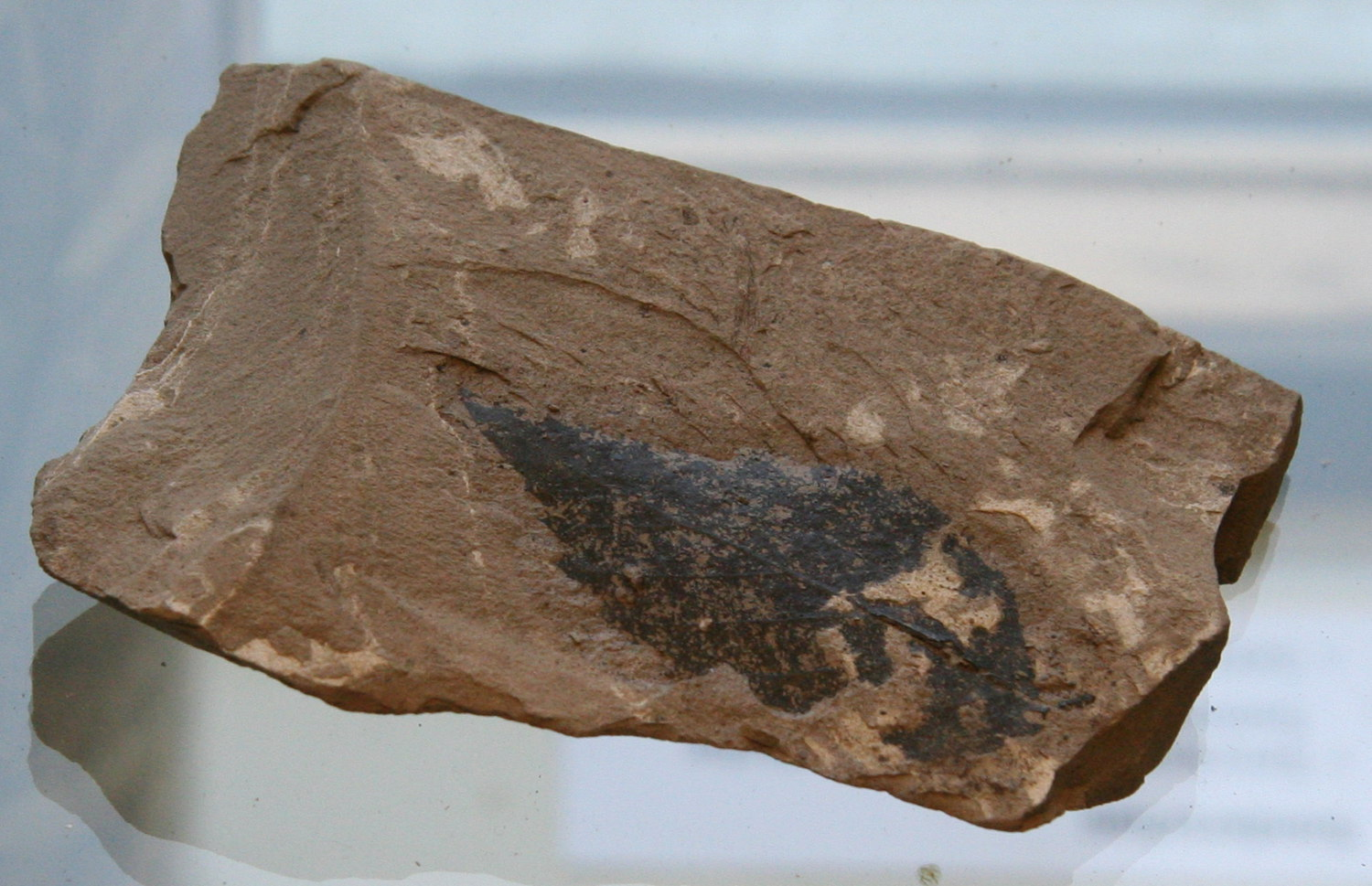 fossiles Blatt von Ulmus fischeri im Botanischen Garten Dresden